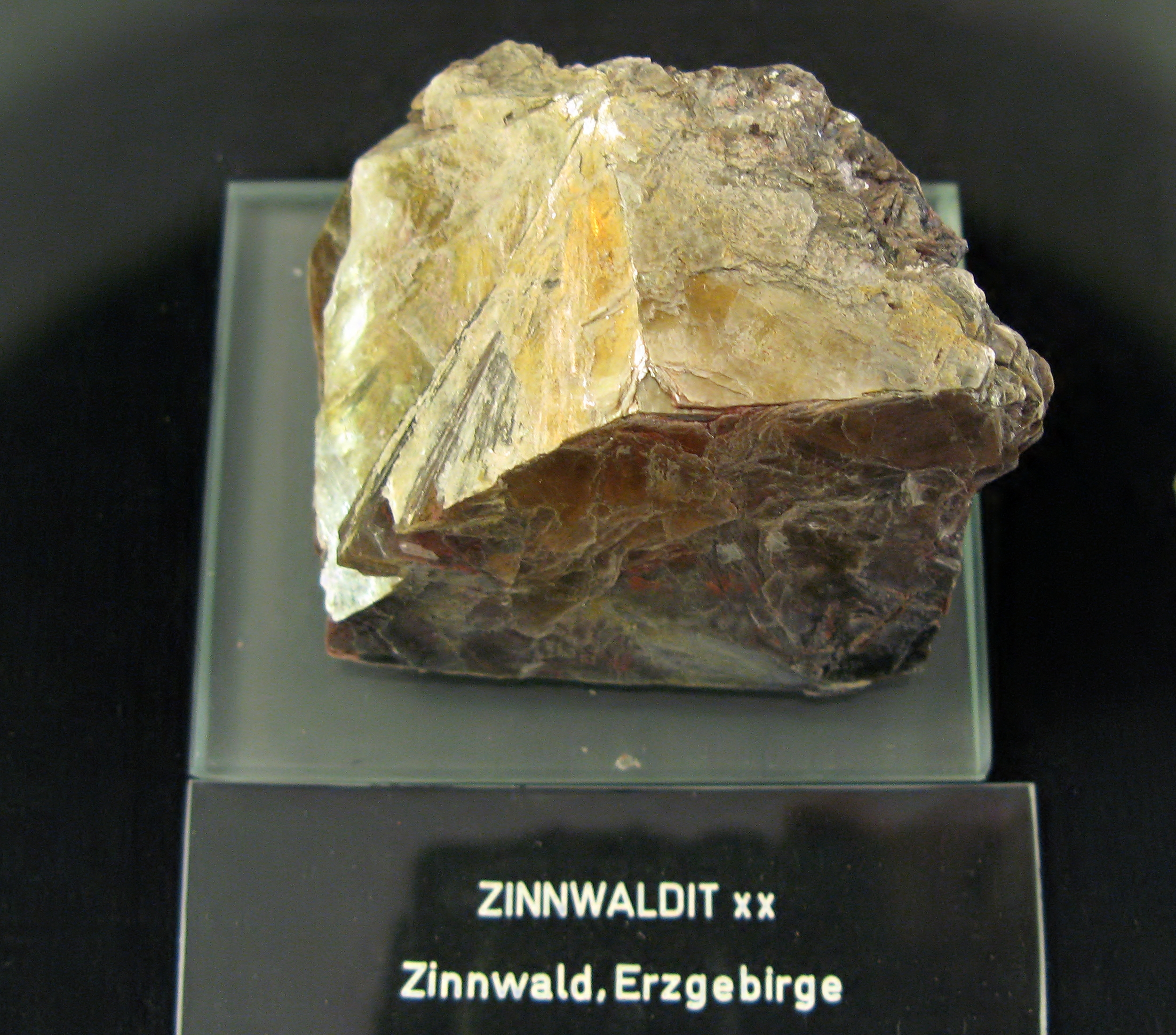 Zinnwaldit - Fundort: Zinnwald, Erzgebirge - Ausgestellt im Mineralogischen Museum Bonn